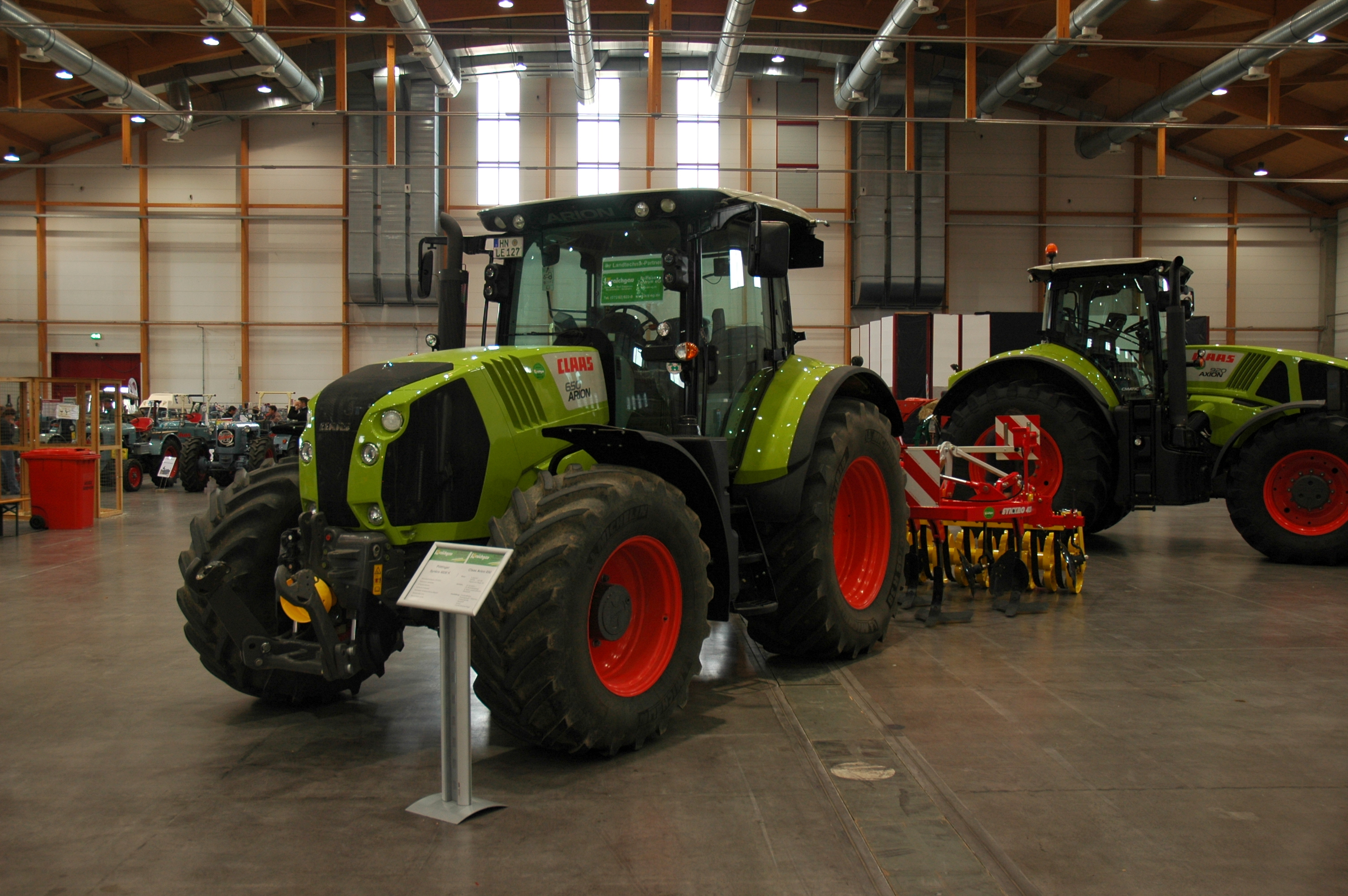 Siensheim Agri Historica 2015 - Claas Arion 650 mit Pöttinger Synkro 4020 K